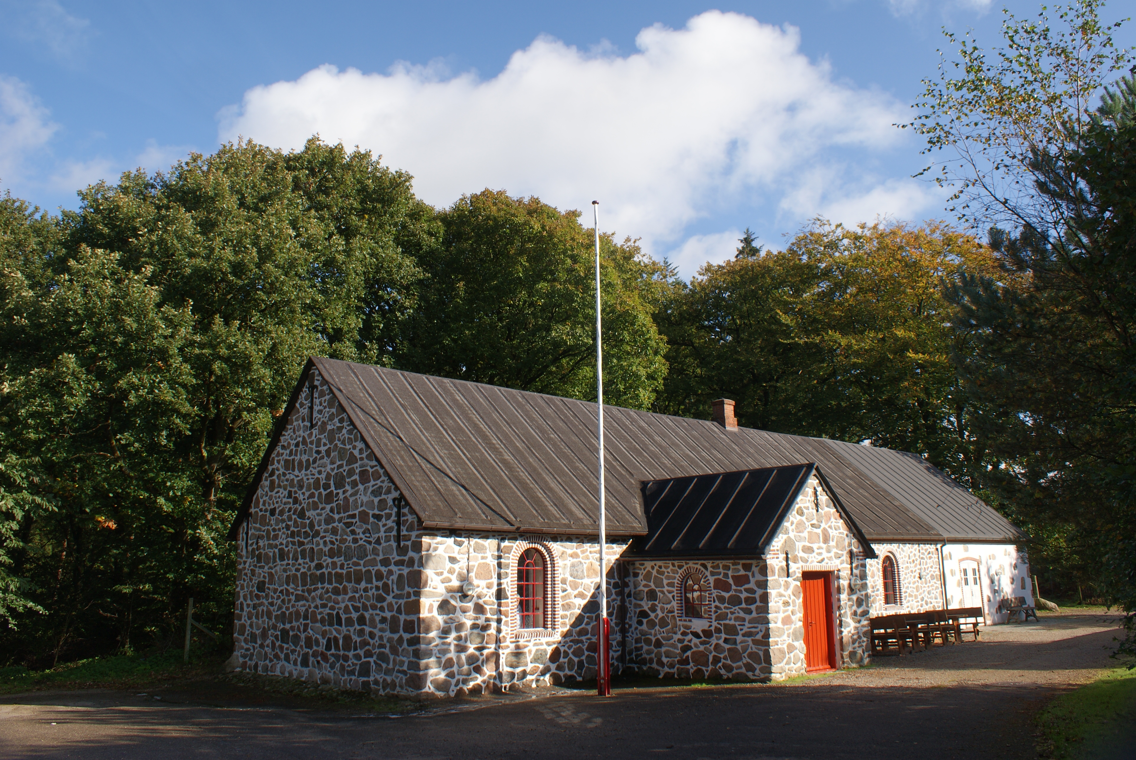 Gjessø Forsamlingshus